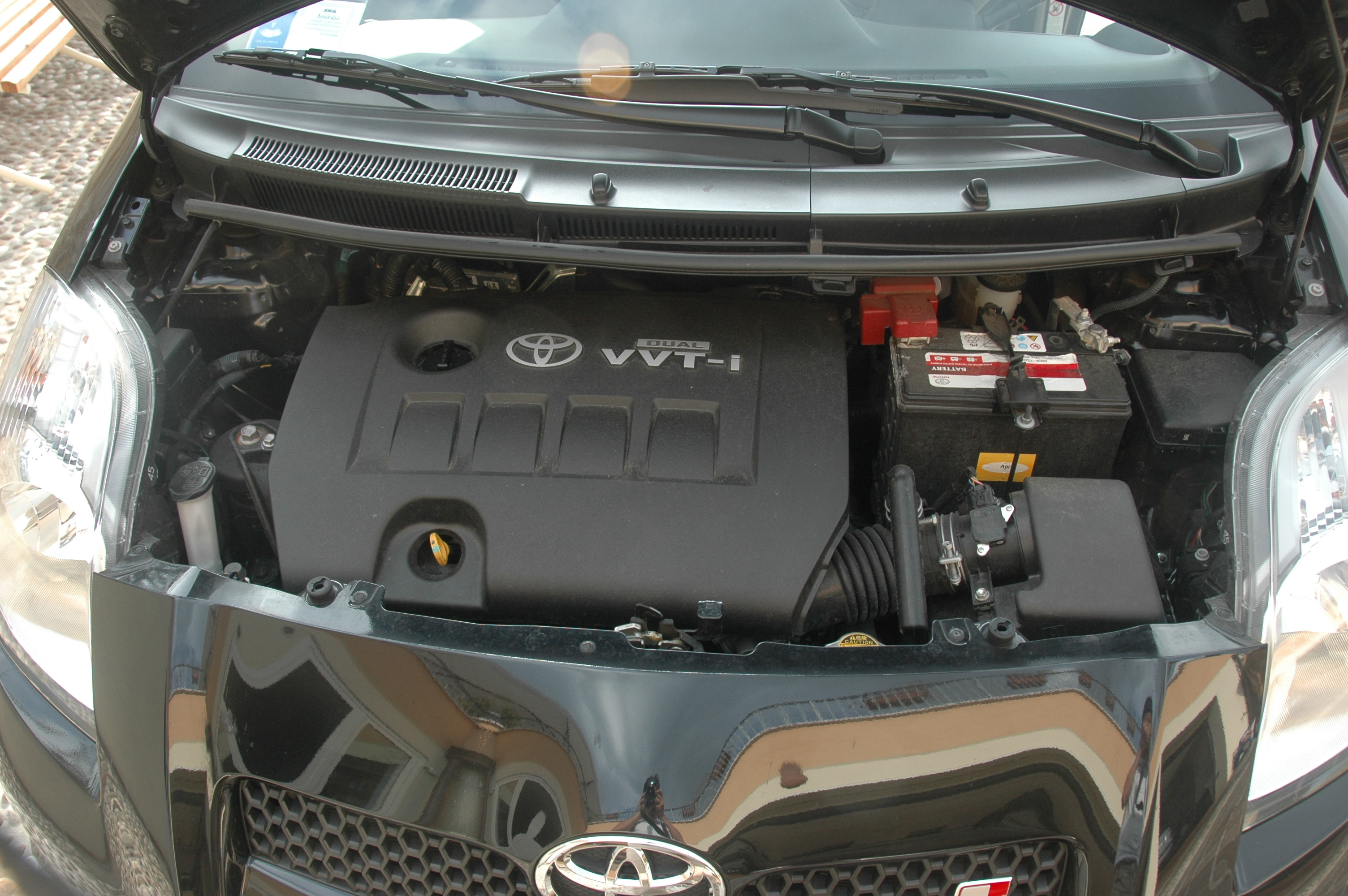 Il motore della Yaris TS seconda erie